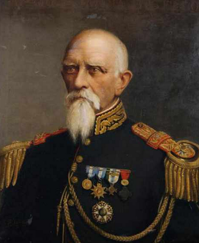 General José María Bustillo con sus medallas.